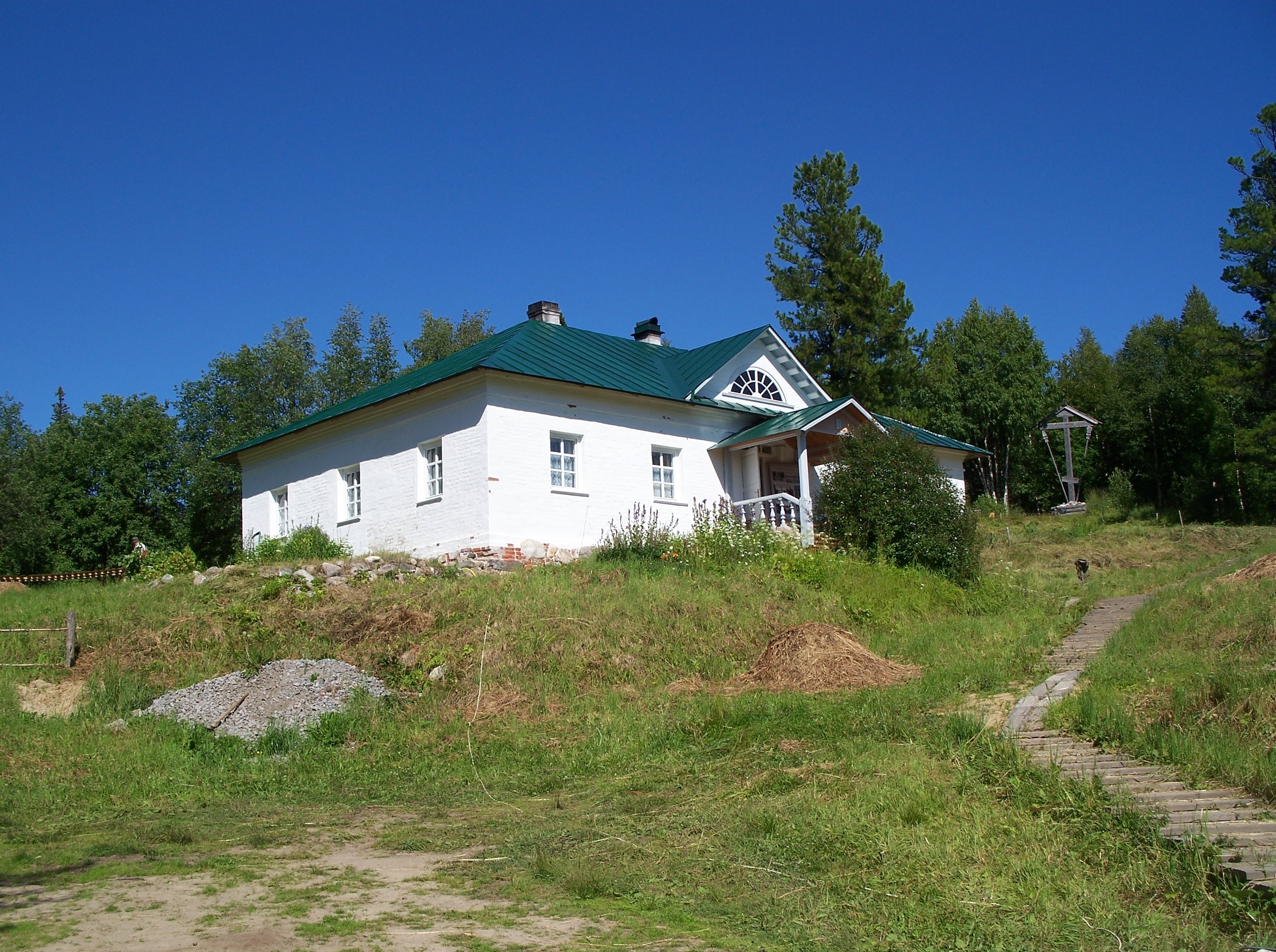 Пустынь Иисусова (Филипповская) (Архангельская область, Архангельск, остров Большой Соловецкий)